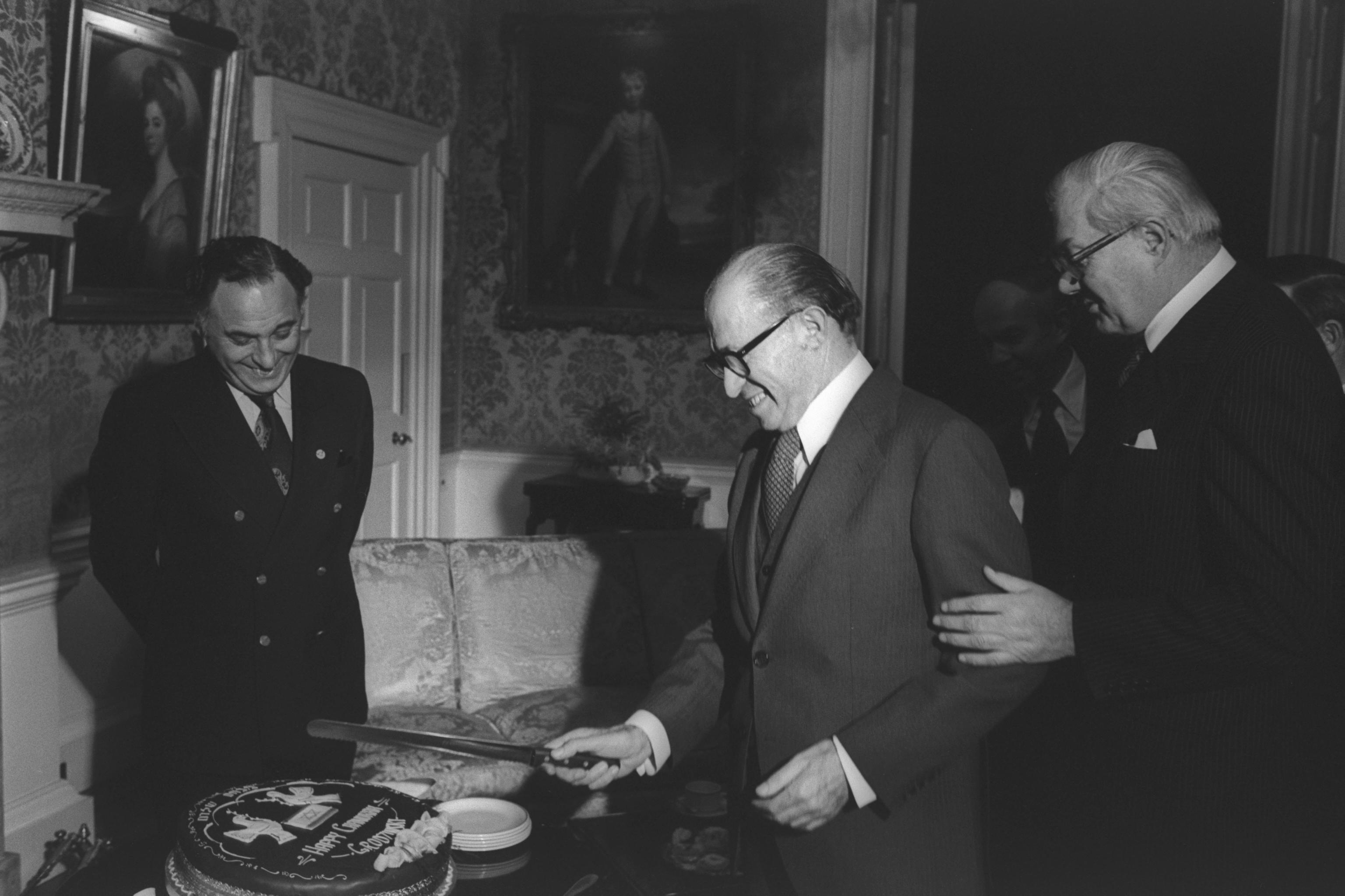 P.M. CALLAGHAN TAKING P.M. MENAHEM BEGIN TO TABLE WITH A HANUKA CAKE PREPARED IN HIS HONOR AT NO. 10 DOWNING STREET (04/12/1977). ביקור רהמ מנחם בגין בבריטניה. בצילום, רהמ ממשלת בריטניה קלגהן מוביל את רהמ בגין לשלוחן עליו מונחת עוגה לכבוד חג החנוכה, בדאונינג 10, בלונדון. Photo: SAAR YAACOV.